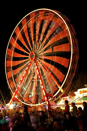 Basler Herbstmesse 2005: Riesenrad